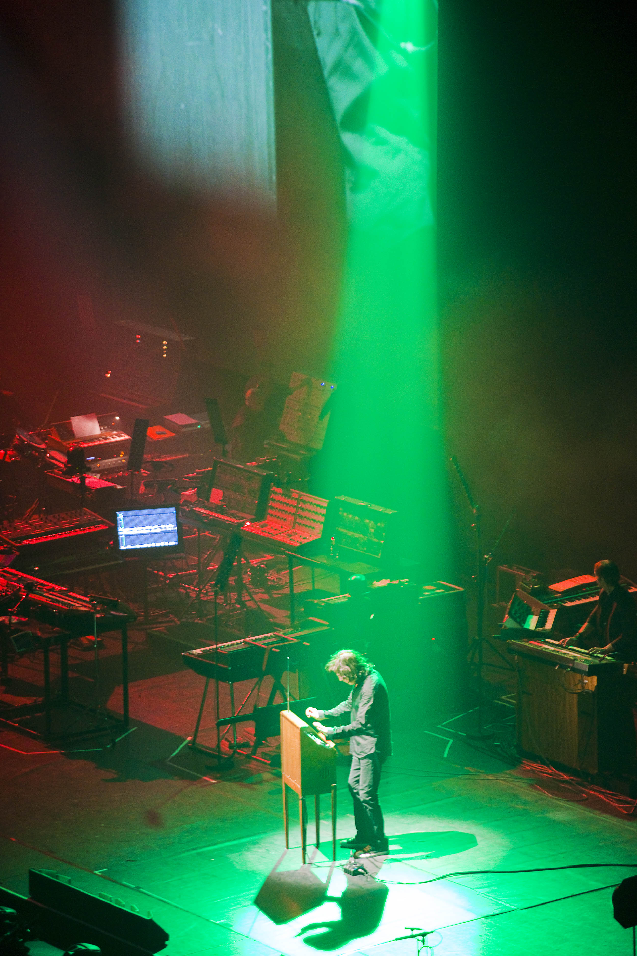 Jean Michel Jarre spielt auf einem Theremin